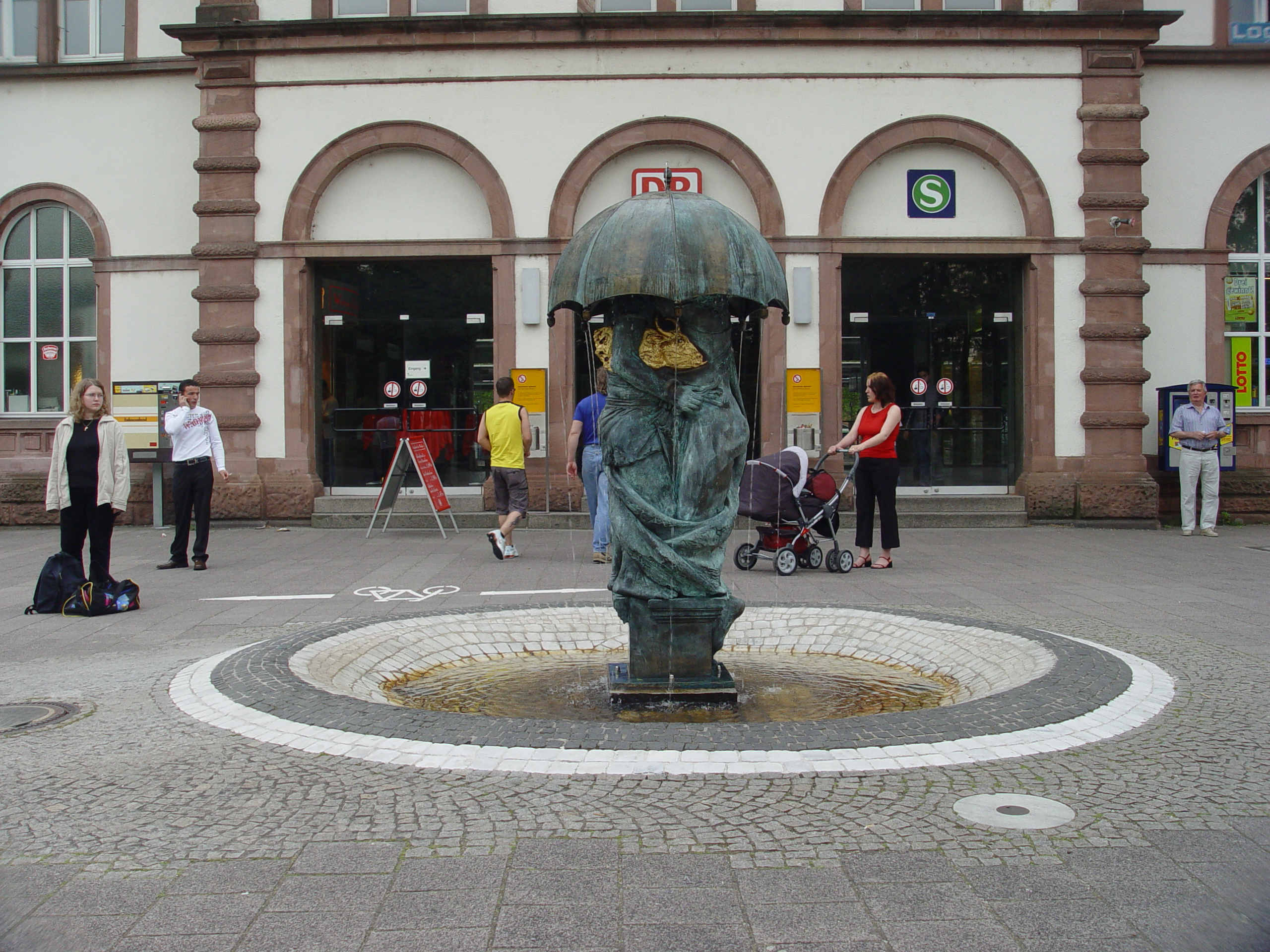 Motiv: Das Rastatter Rätsel ist eine Skulptur von Jürgen Goertz vor dem Rastatter Bahnhof und am Ende der Rastatter Fußgängerzone. Die Auflösung des Rastatter Rätsel, eine weitere Skulptur von Jürgen Goertz, befindet sich in der Rastatter Innenstadt, am Ende der Fußgänger Zone, beim Museumstor. Kamera: Sony DSC-F717